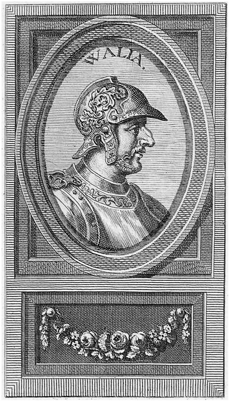 Reyes visigodos de Hispania. Retrato de Walia